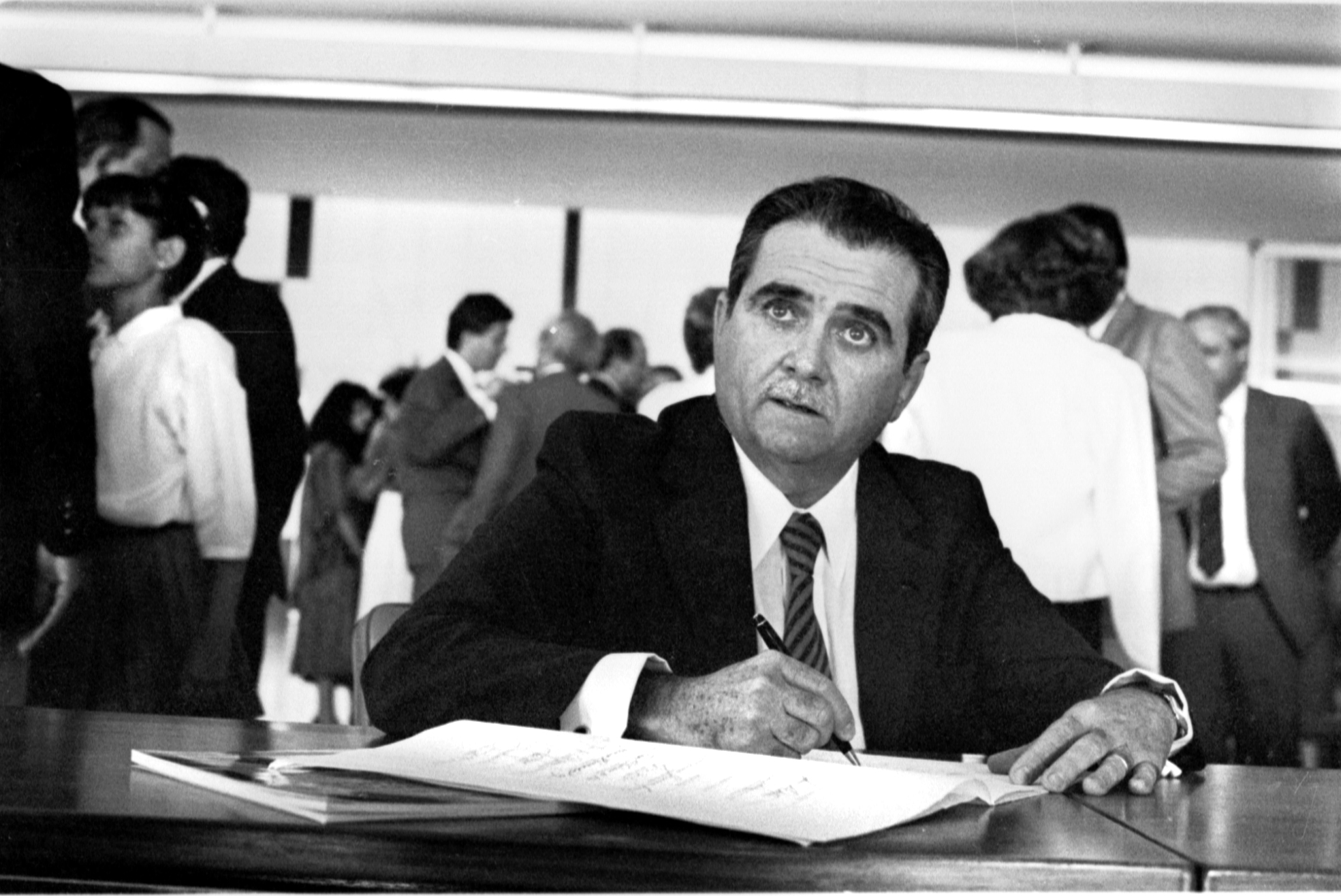 Assinatura da Constituição em 29/09/1988. Participantes - Senador João Castelo. Foto: Célio Azevedo